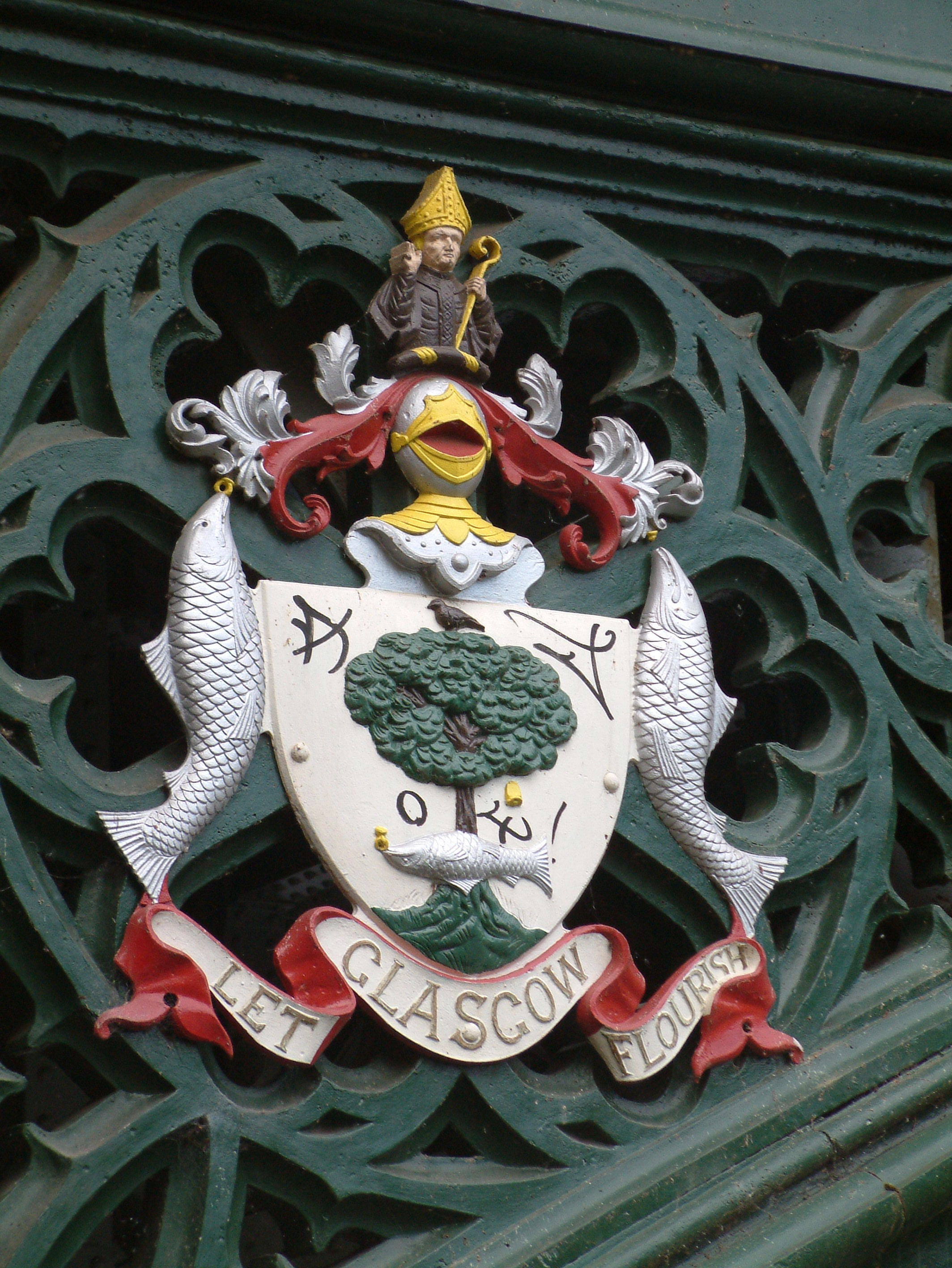 vlastni foto